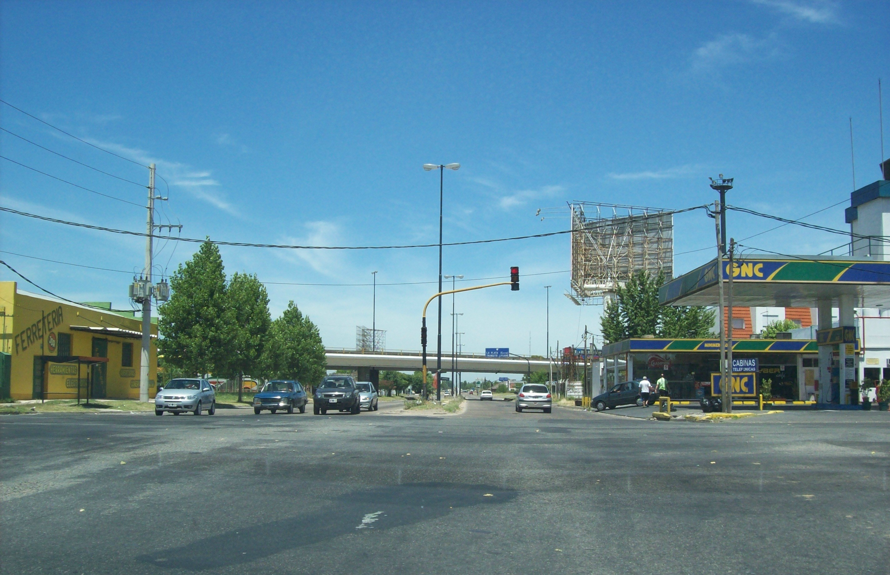 Avenida 520 (Ruta Provincial 13) hacia el sudoeste en la esquina con el camino Centernario (Ruta Provincial 14). Al fondo, puente del Camino General Belgrano (Ruta Provincial 1). Ubicado en el límite entre Tolosa y Ringuelet, partido de La Plata, Provincia de Buenos Aires, Argentina.